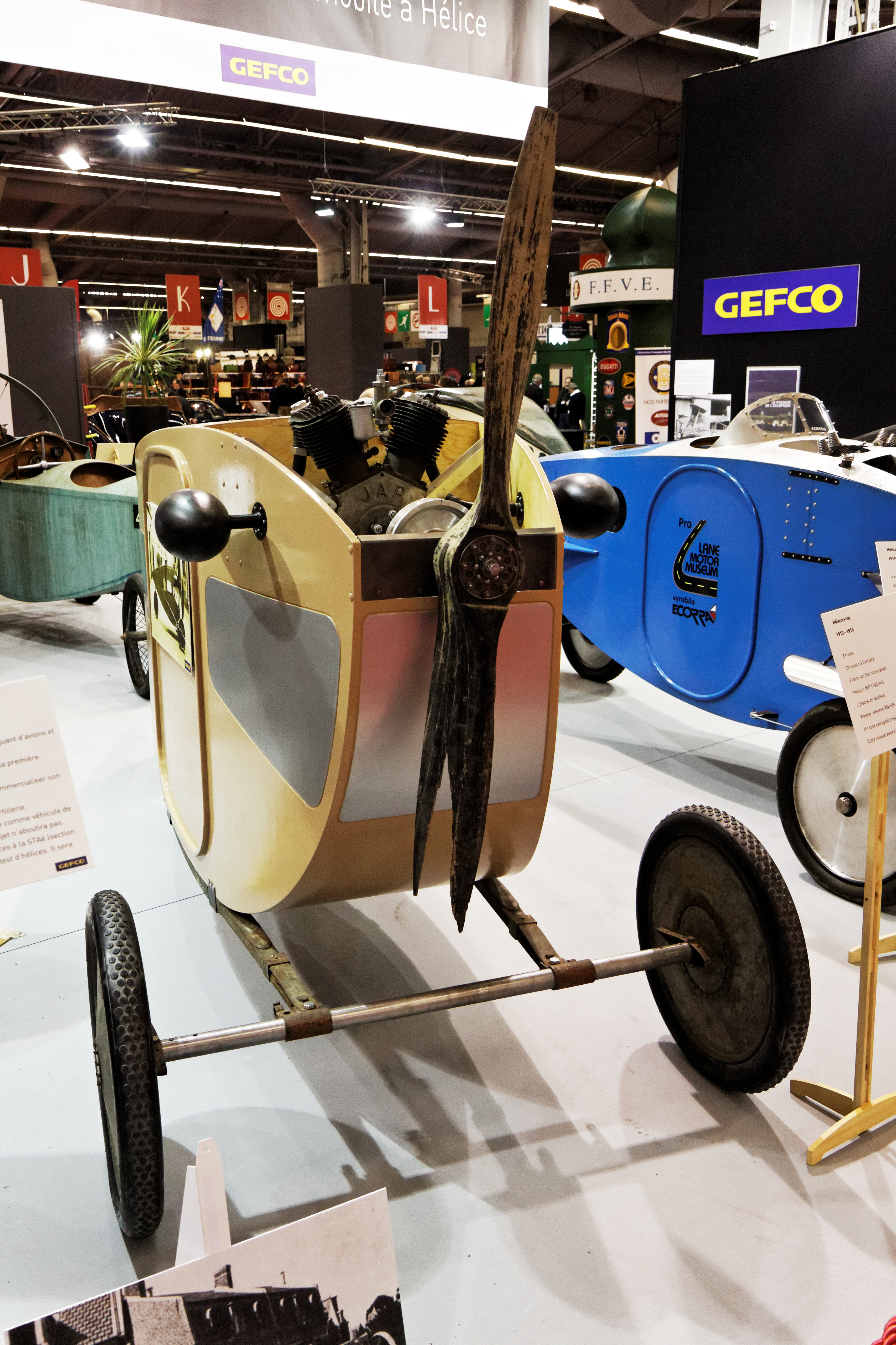 Une voiture à hélice Hélicocycle présentée lors du salon Retromobile 2013.